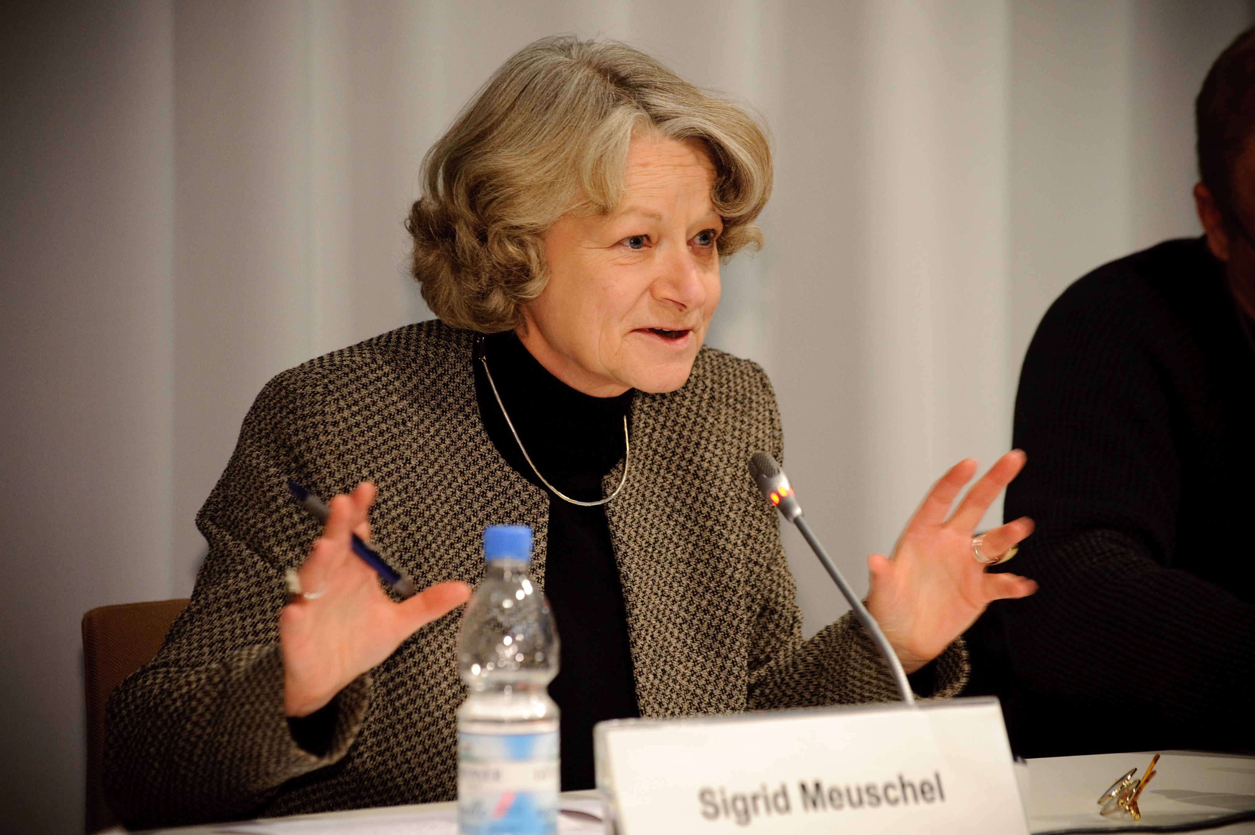 Foto: Stephan Röhl Podiumsdiskussion: Wie viel Wohlfahrt braucht die Demokratie?